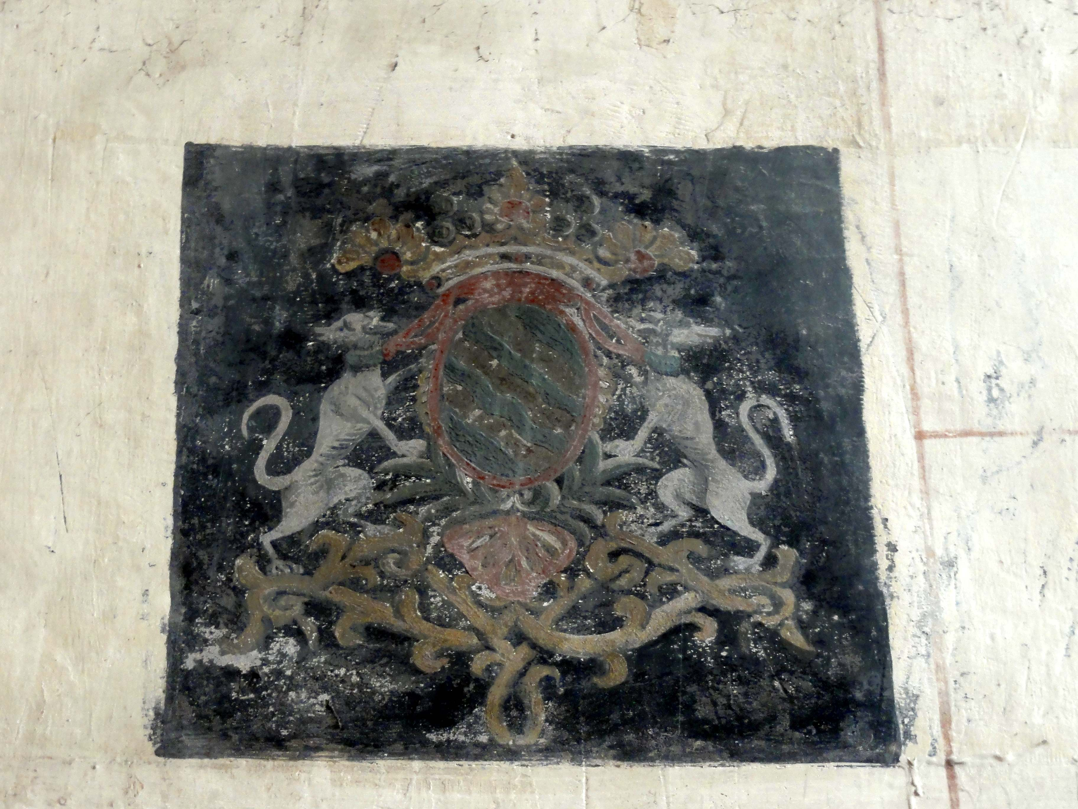 Intérieur de l'église Saint-Pierre-et-Saint-Paul (voir titre).